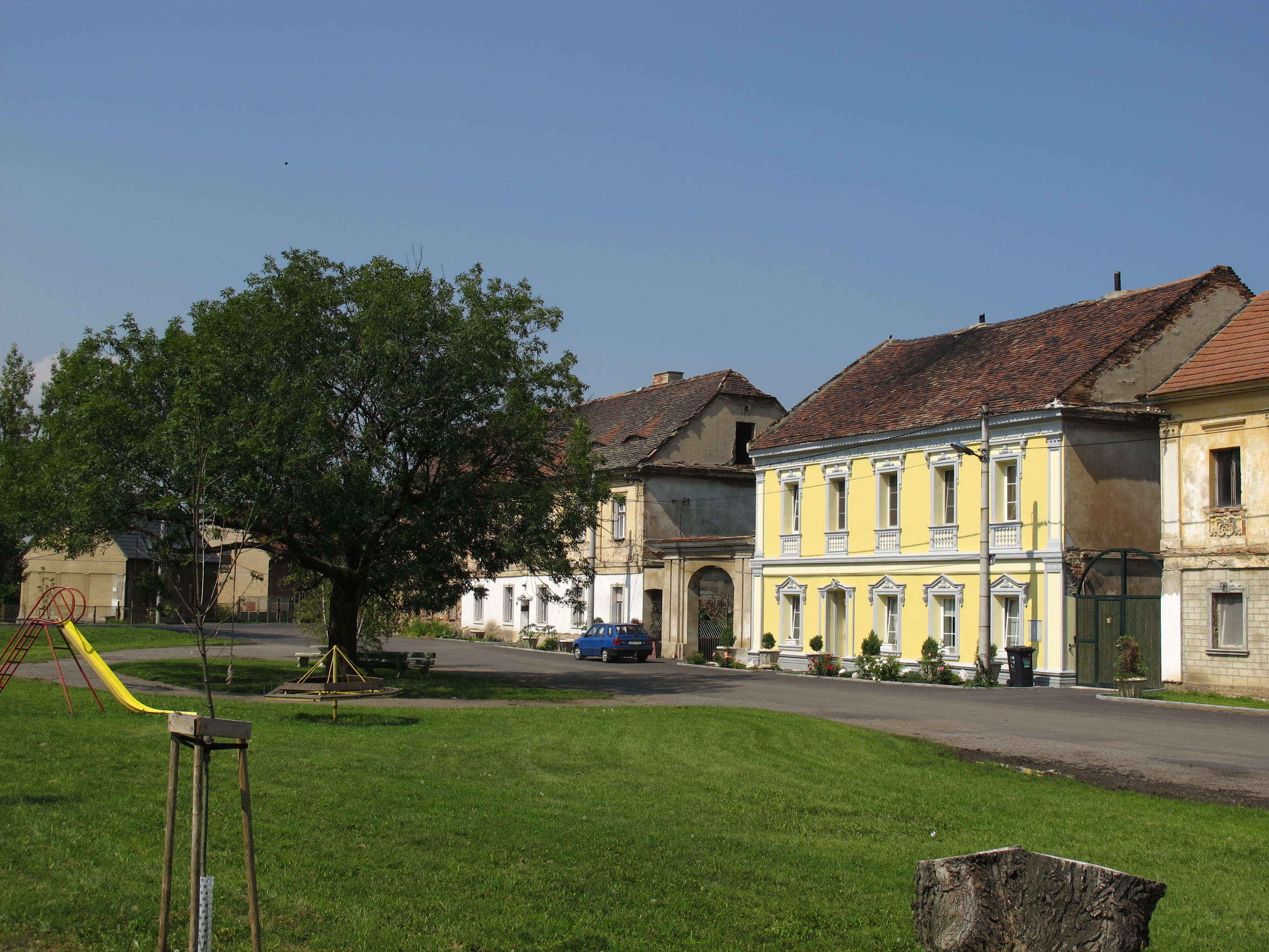 Osada Nemilkov, okres Most - náves